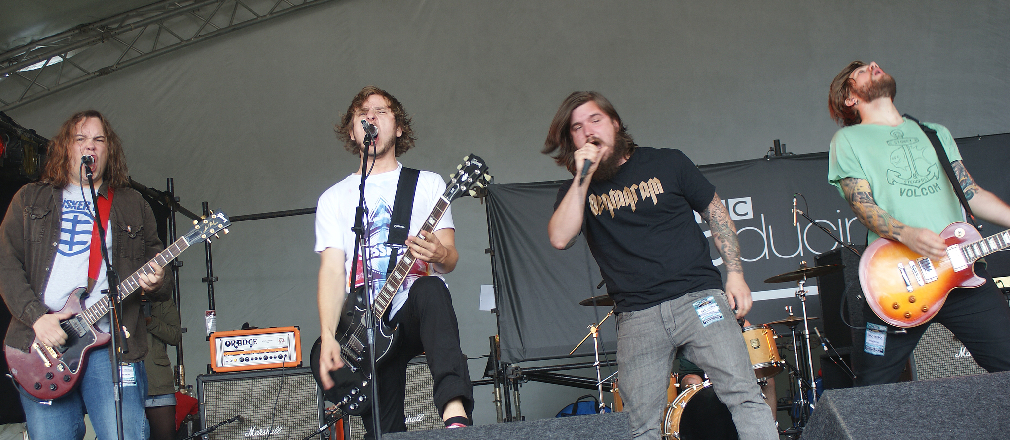 Norwegian metal band, Kvelertak.